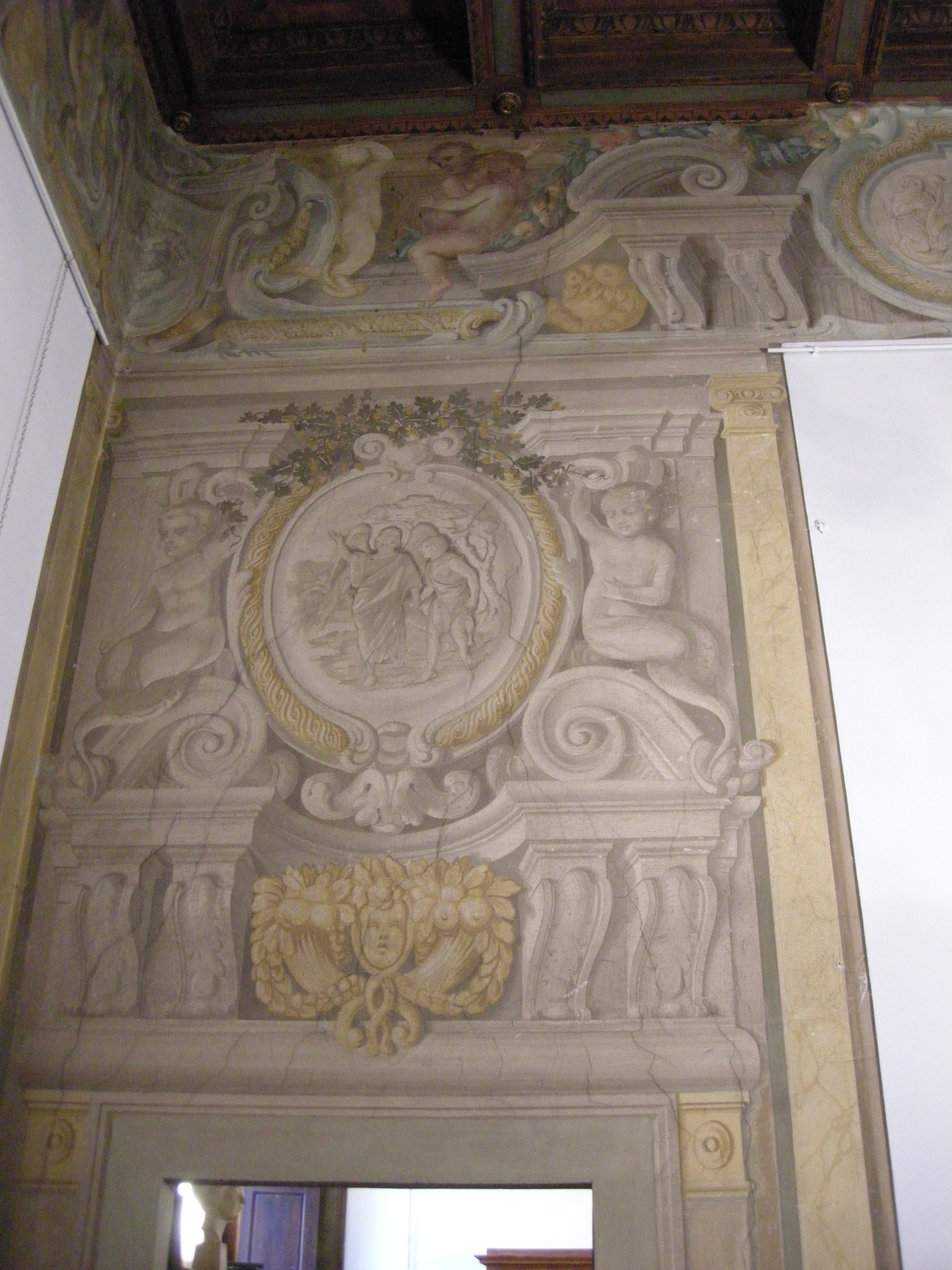 Palazzo giugni sala 2